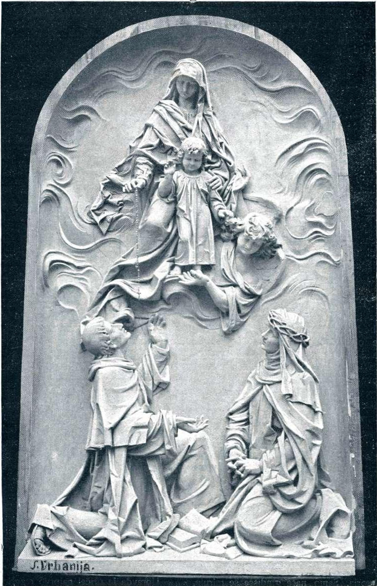 Mati božja sv. Rožnega venca. Sv. Dominik in Roza Limanska.